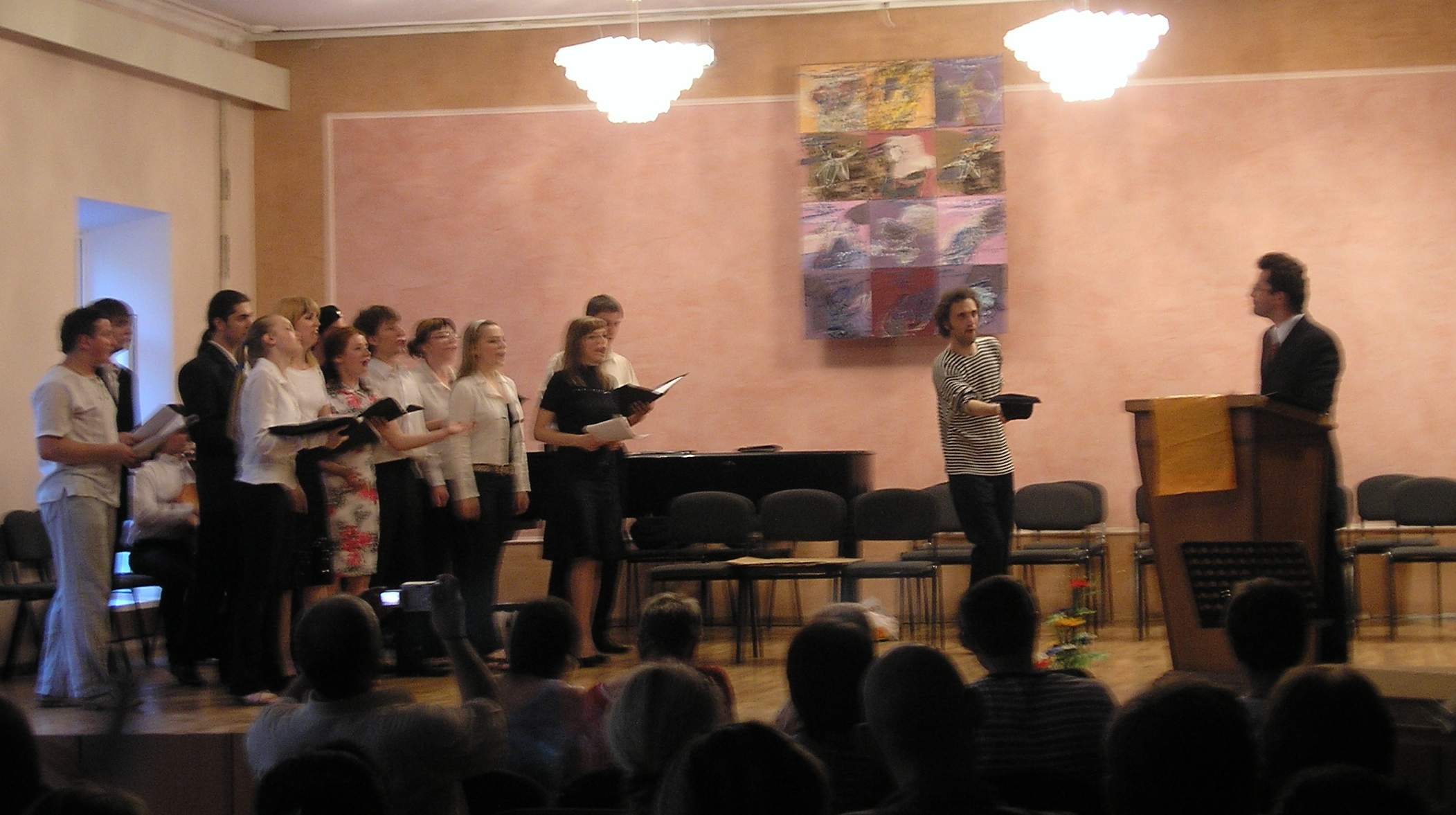 Андрій Бондаренко, «Райок по-українськи», для солістів, камерного хору, фортепіано, кларнета і віолончелі. Фестиваль «Форум музики молодих” Концерт сатиричної музики 20-21 століть. Концертний зал Спілки композиторів України. Субота, 26 травня 19.00, Київ